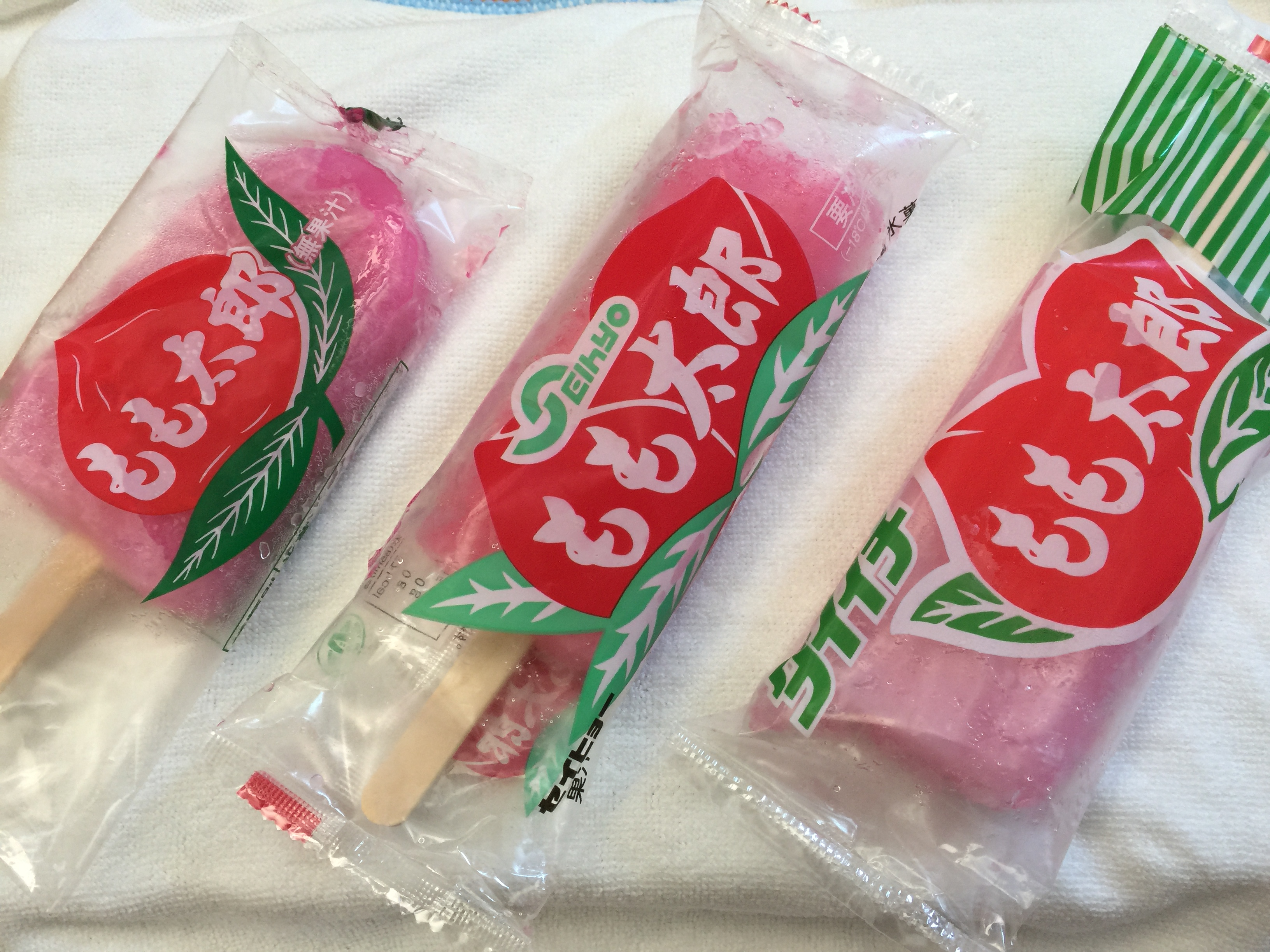 もも太郎アイスとパッケージ